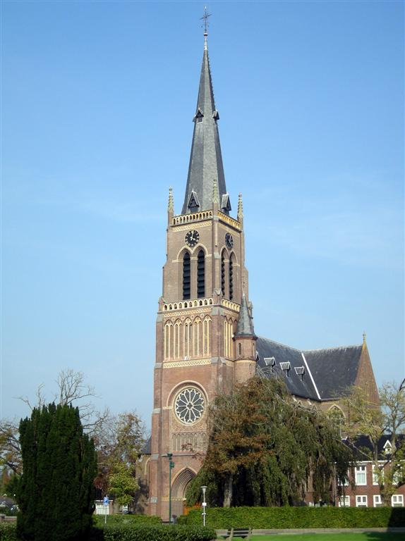 Sint Nicolaaskerk (church) in Sint Nicolaasga